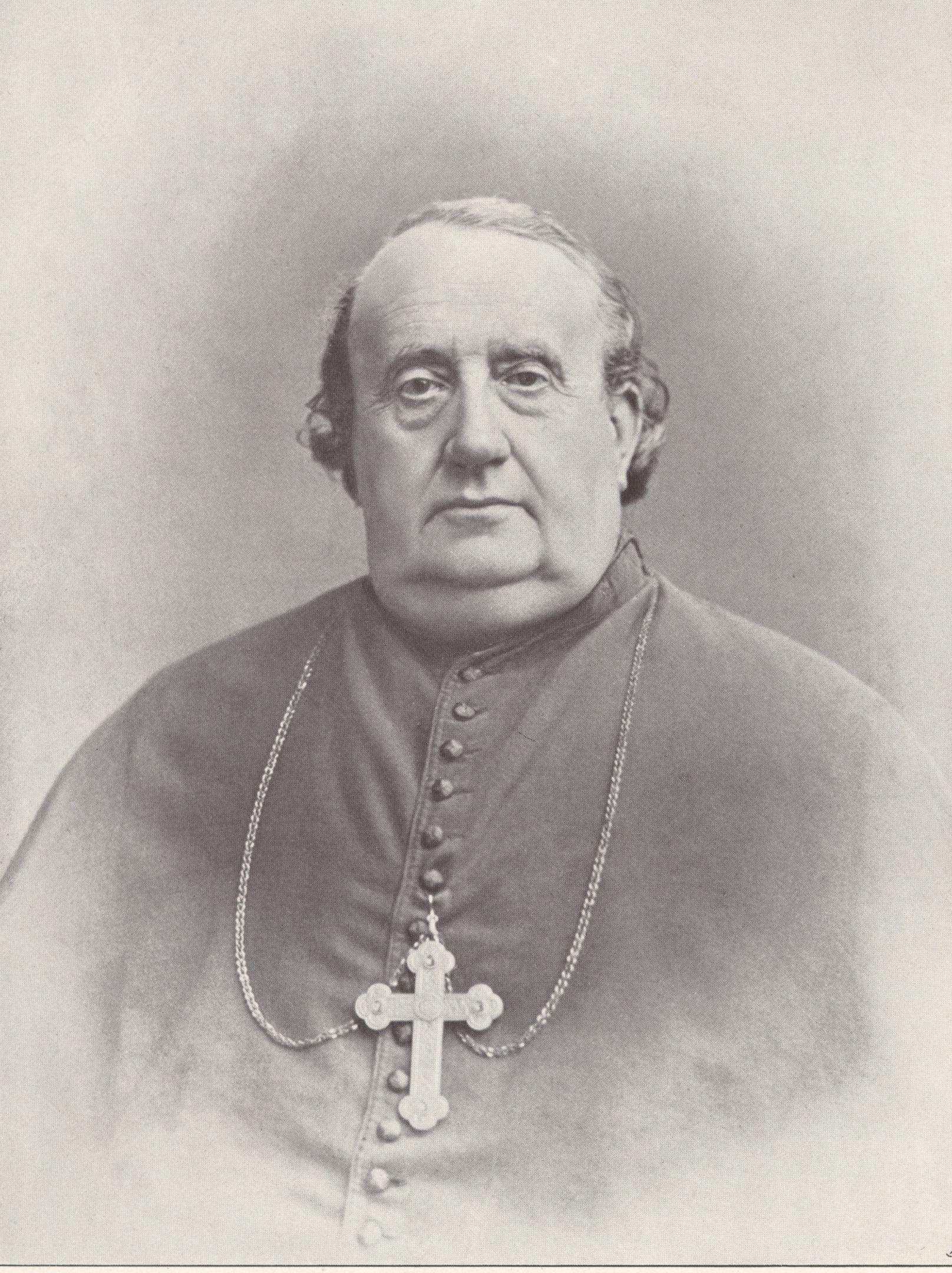 Erzbischof Joseph von Schorck, Bamberg